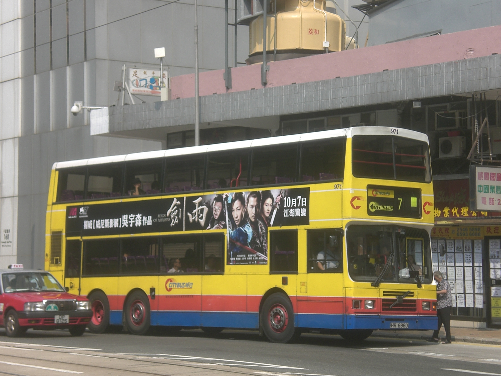 香港西營盤德輔道西，巴士車身廣告《劍雨》